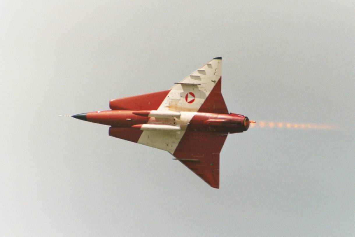 Saab J 35Ö Draken, 351408, ursprungligen J 35D Draken (35335) vilken såldes i slutet av 1980-talet till Österrike.